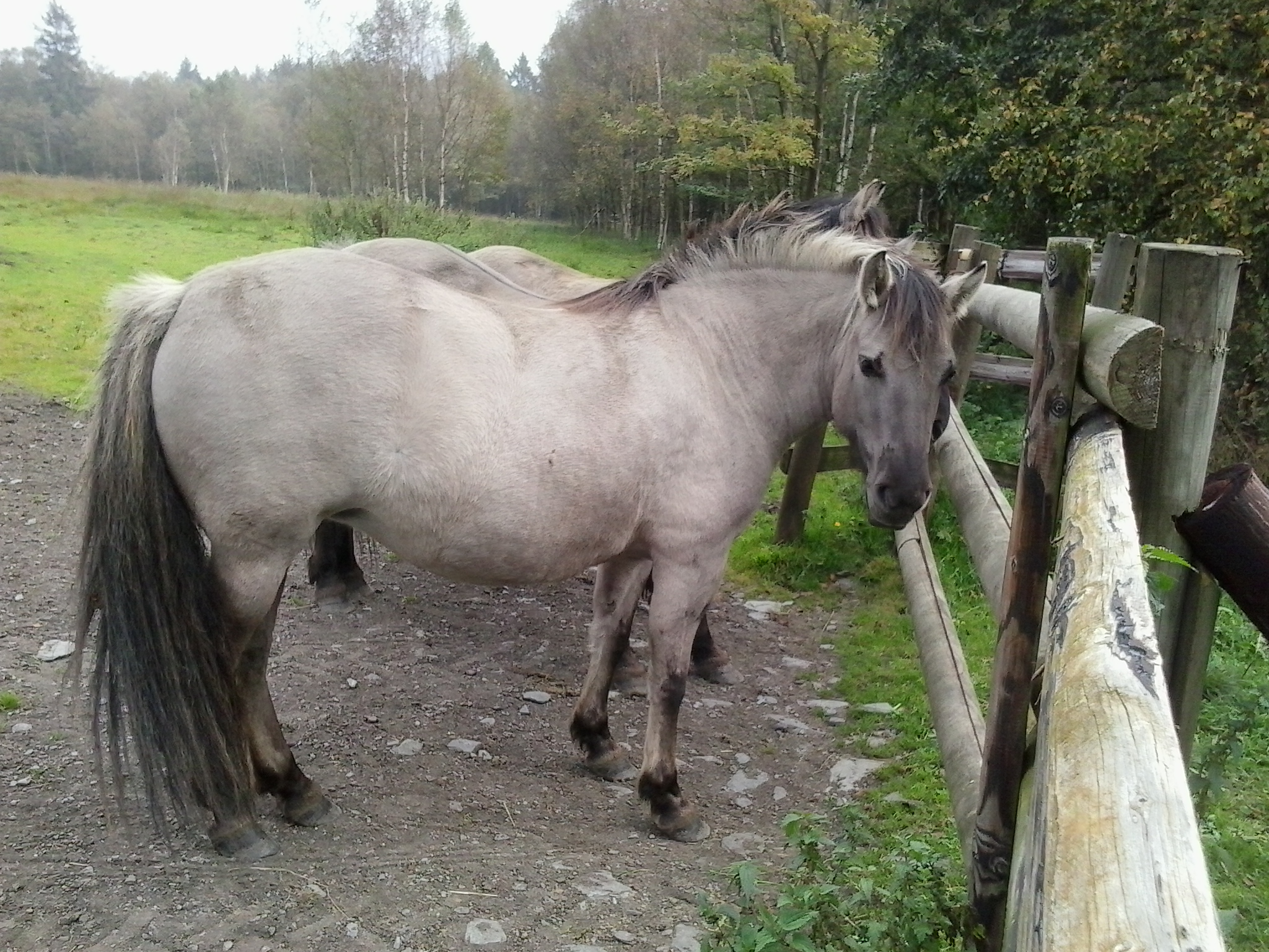 Konik polski, introduits sur le site Natura 2000 des Hauts-Buttés, hameau de Monthermé, departement des Ardennes, france